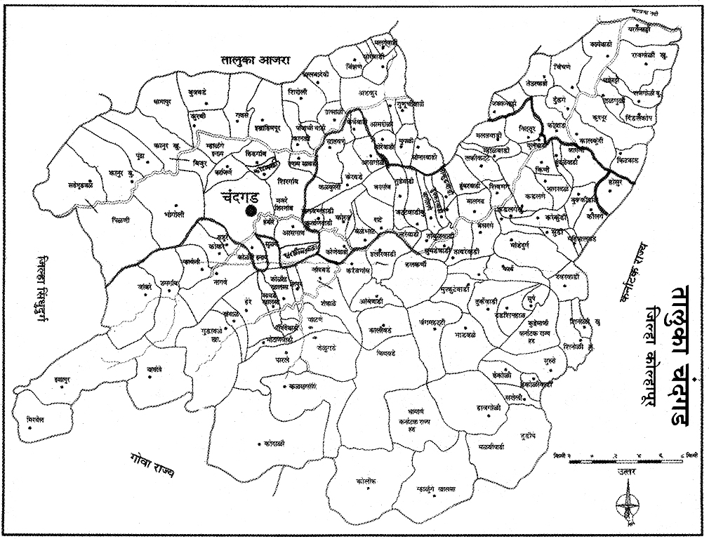 चंदगड तालुका